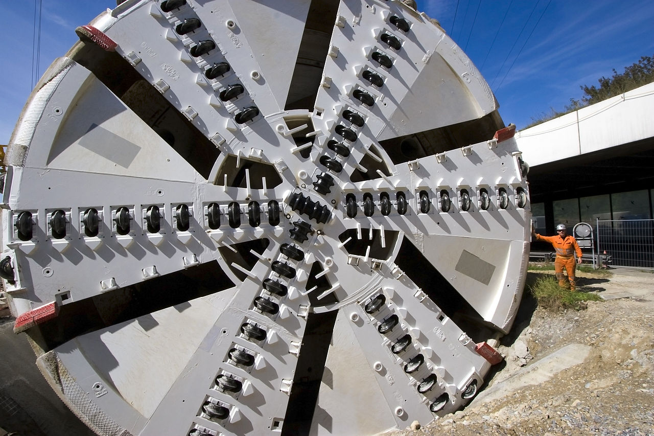 Vue de la roue de coupe du tunnelier lors de la journée "Portes ouvertes" du chantier du second tube du Tunnel du Pfänder